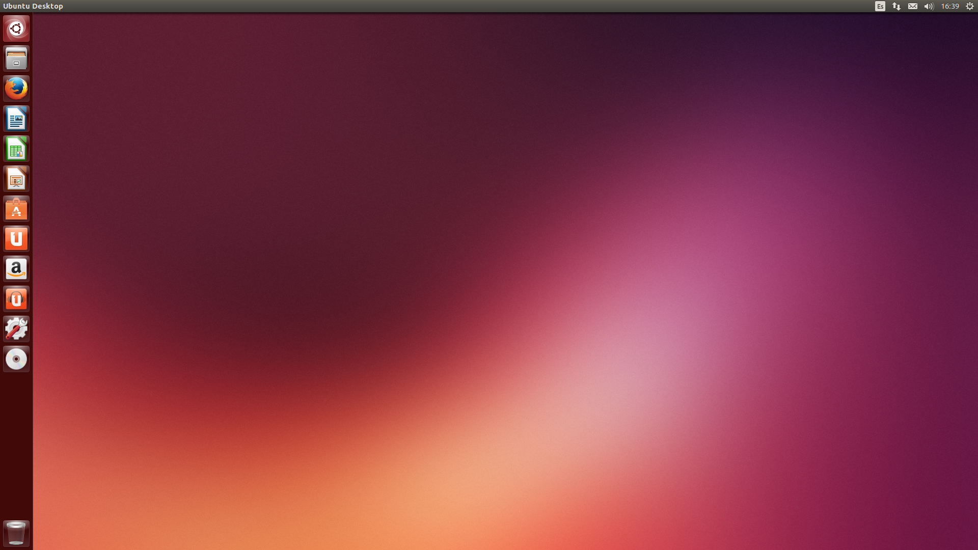 Captura de pantalla d'Ubuntu 13.10 Saucy Salamander